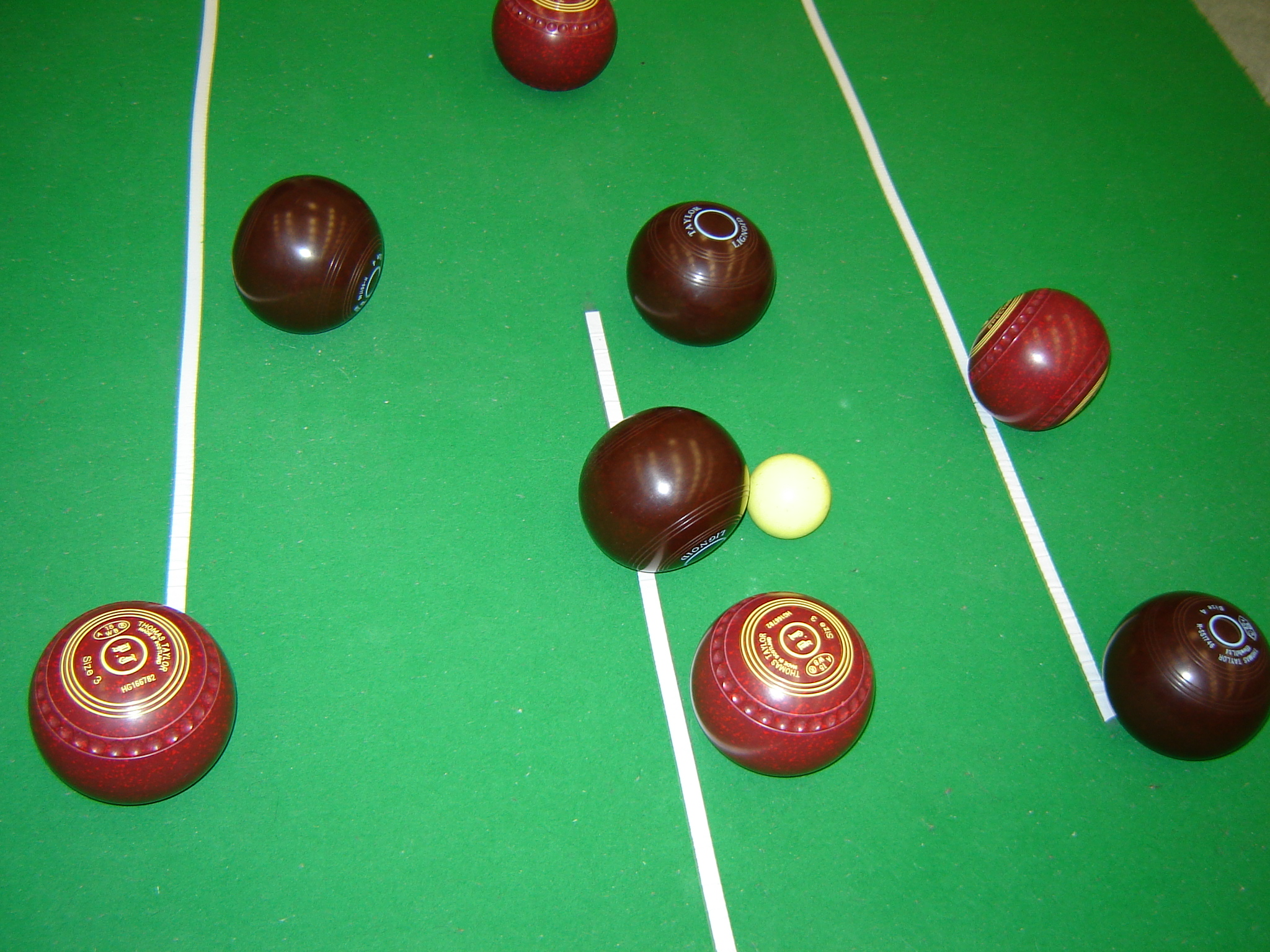 Foto Curve Bowls